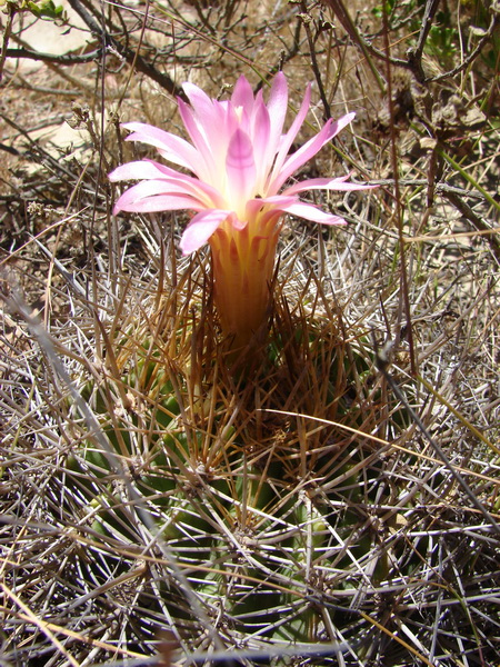 me dejó muy metido este cactus, pues E. subgibbosa florece en julio-agosto y este lo pillé en noviembre y en la ladera norte del santa inés a 200 o 300 mt de altura